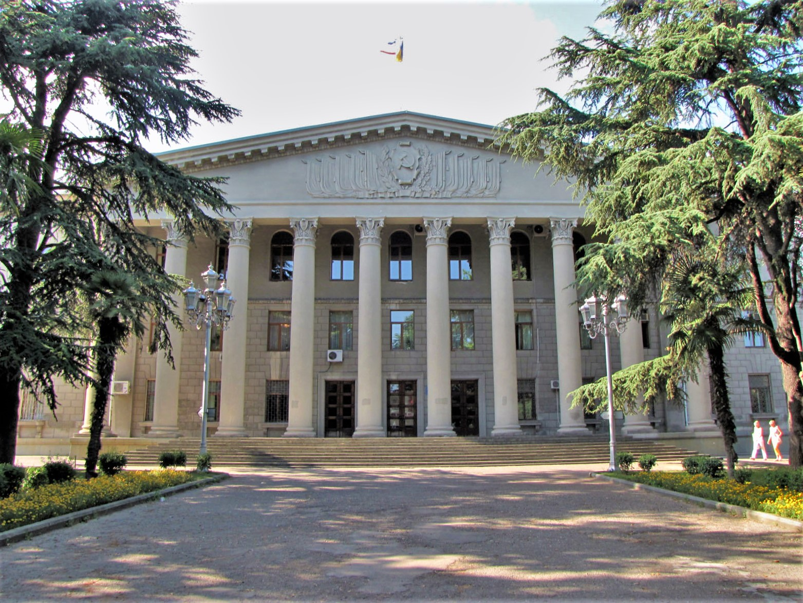 Здание администрации города Ялты